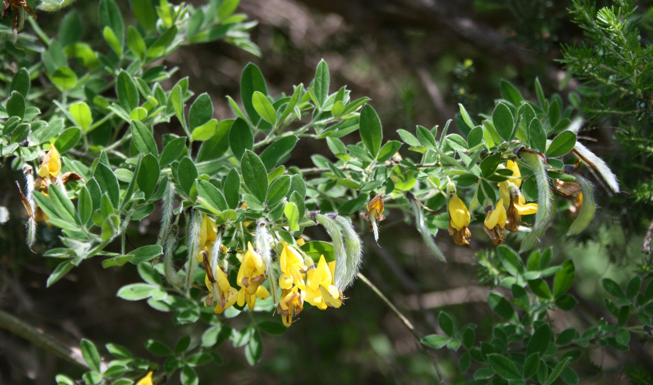 Cytisus villosus, Hülsenfrüchtler (Fabaceae) - Italien/Italia/Italy: Kalabrien/Calabria, Prov. Reggio Calabria, Aspromonte, SE Melia, ESE Scilla